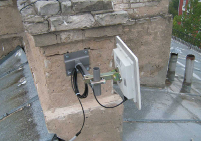 Абонентский комплект, используемый на сети Энфорта